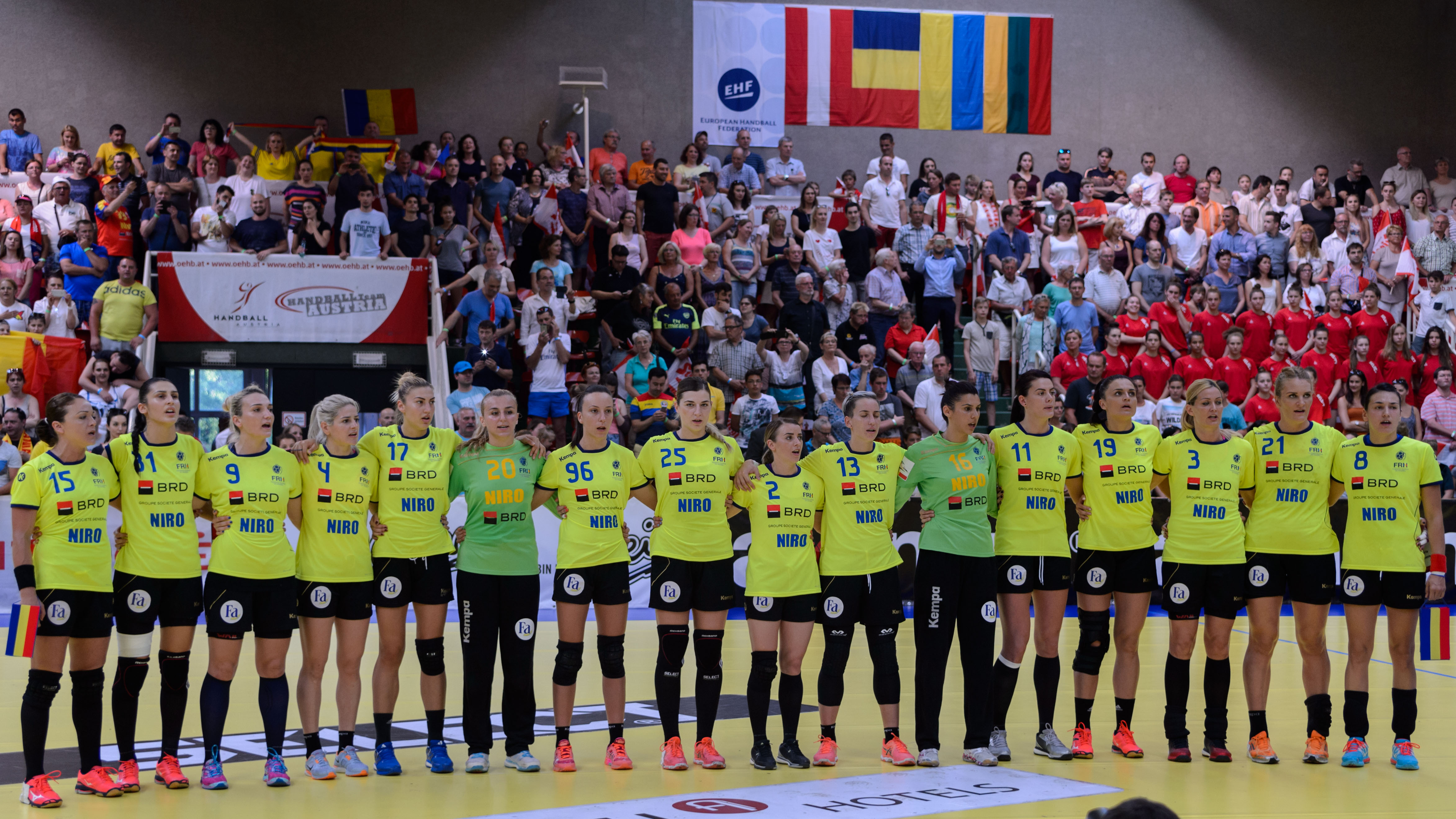 Damen-Handball WM-Qualifikation 13.06.2017: Nationalteam Rumänien